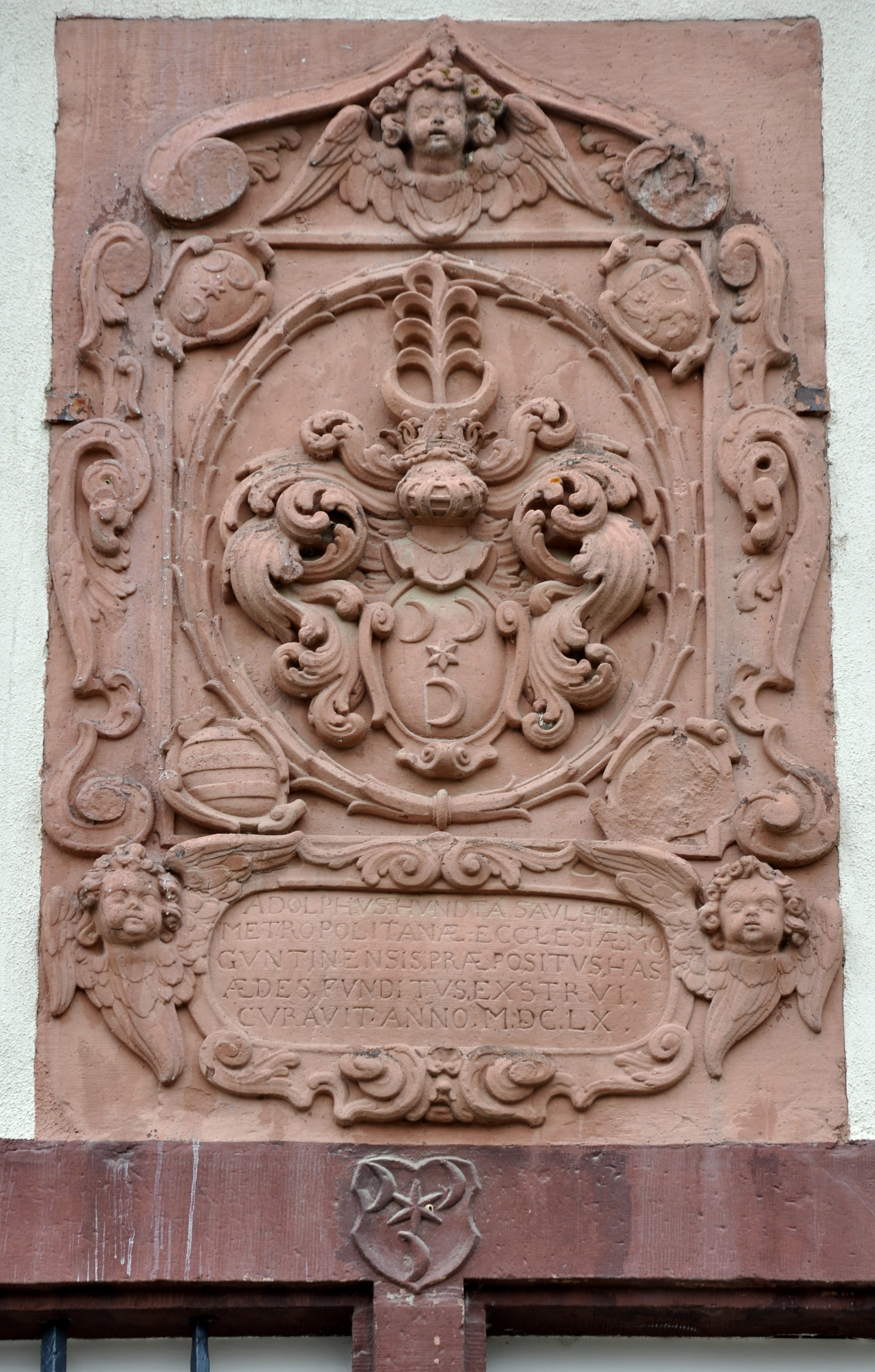 Kiedrich, Bassenheimer Hof, 1660 erbaut für Adolf Hund von Saulheim; Wappenrelief mit dem Wappen Hund von Saulheim, datiert 1660; mit vier Ahnenwappen: Hund von Saulheim, Edle von Dienheim, von Hattstein, zerstört: [von Reiffenberg]; siehe auch